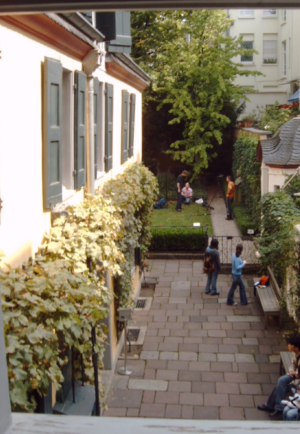 Hof und Garten des Beethovenhauses